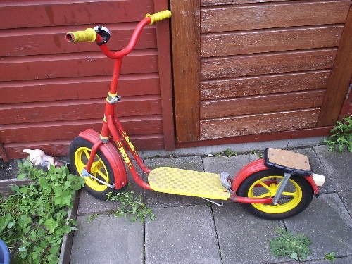 Stepje van het zoontje van de buren